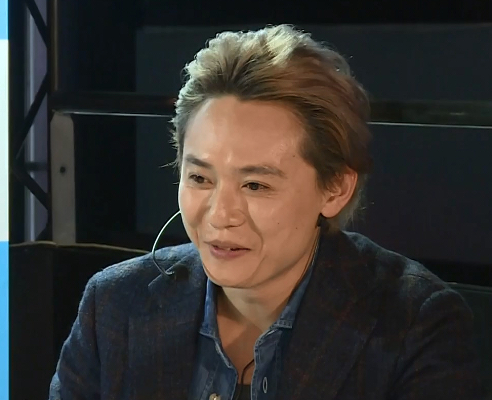 魂ネイション2016「置鮎龍太郎と語る! 『聖闘士星矢 黄金魂 -soul of gold-』 」